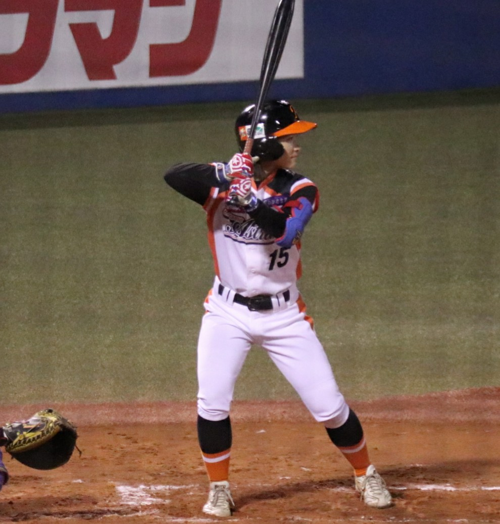 女子プロ野球只埜